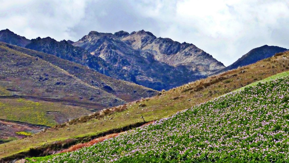 Cordillera de Mérida (Edo. Mérida)